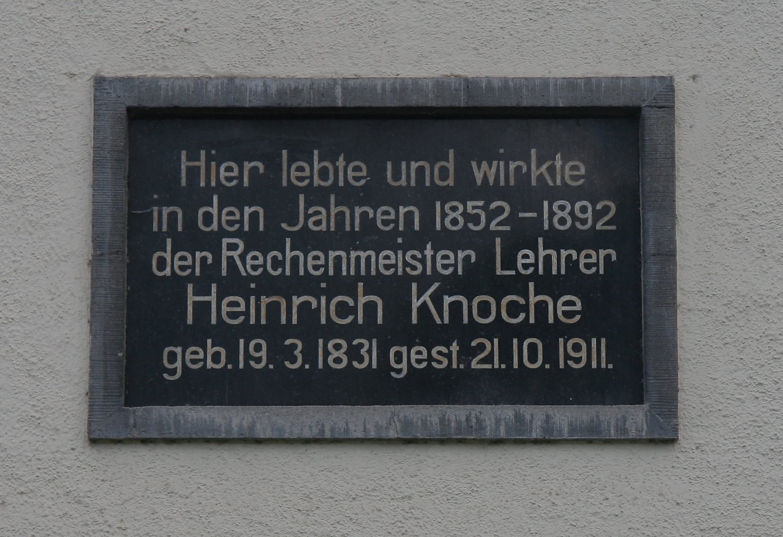 Gedenktafel an Heinrich Knoche am Gebäude der alten Volksschule in Arnsberg-Herdringen mit folgender Aufschrift: „Hier lebte und wirkte in den Jahren 1852 bis 1892 der Rechenmeister Lehrer Heinrich Knoche geb. 19.3.1831 gest. 21.10.1911“.